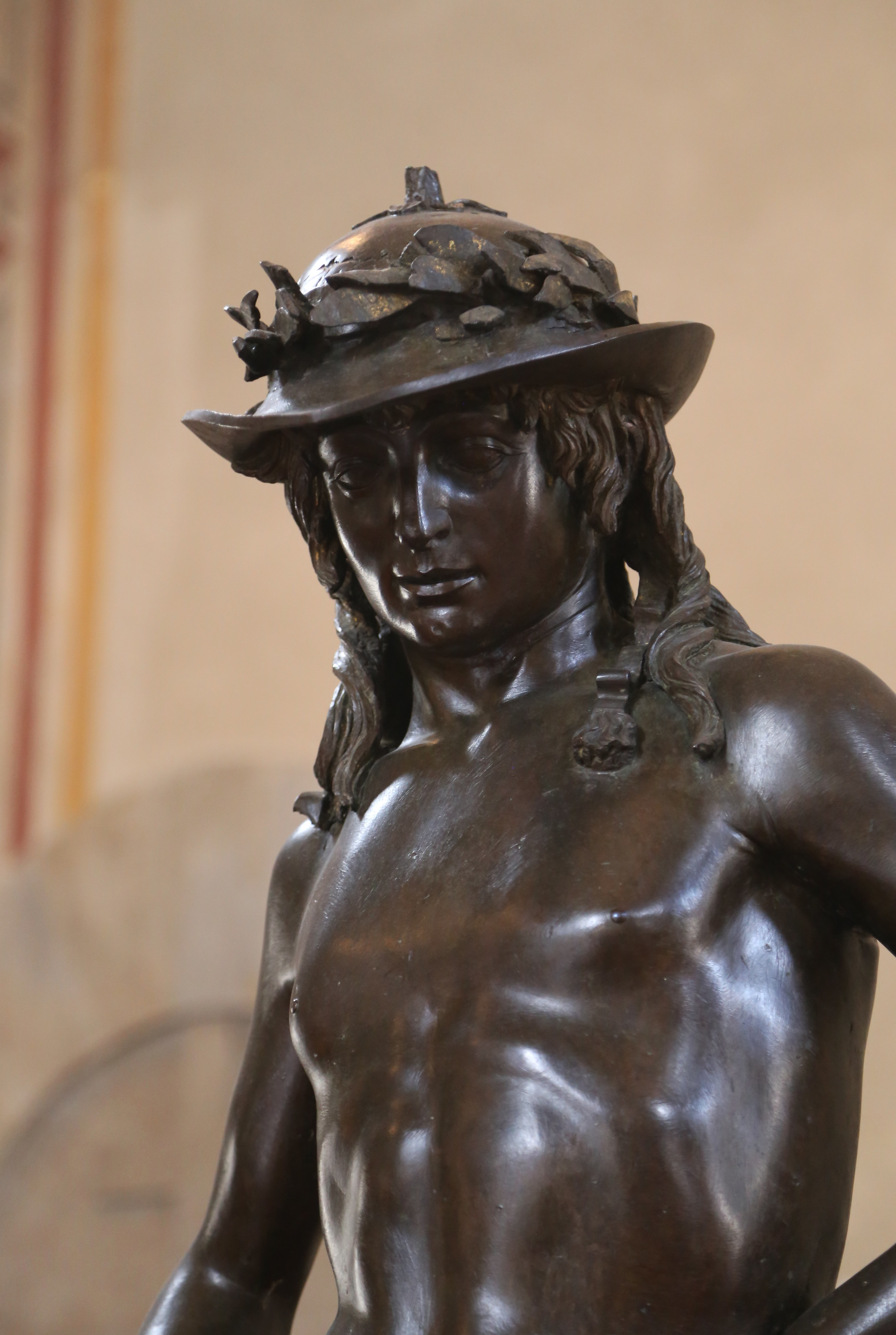 David, Donatello, ca. 1440, Bronze, Museo del Bargello, Florenz